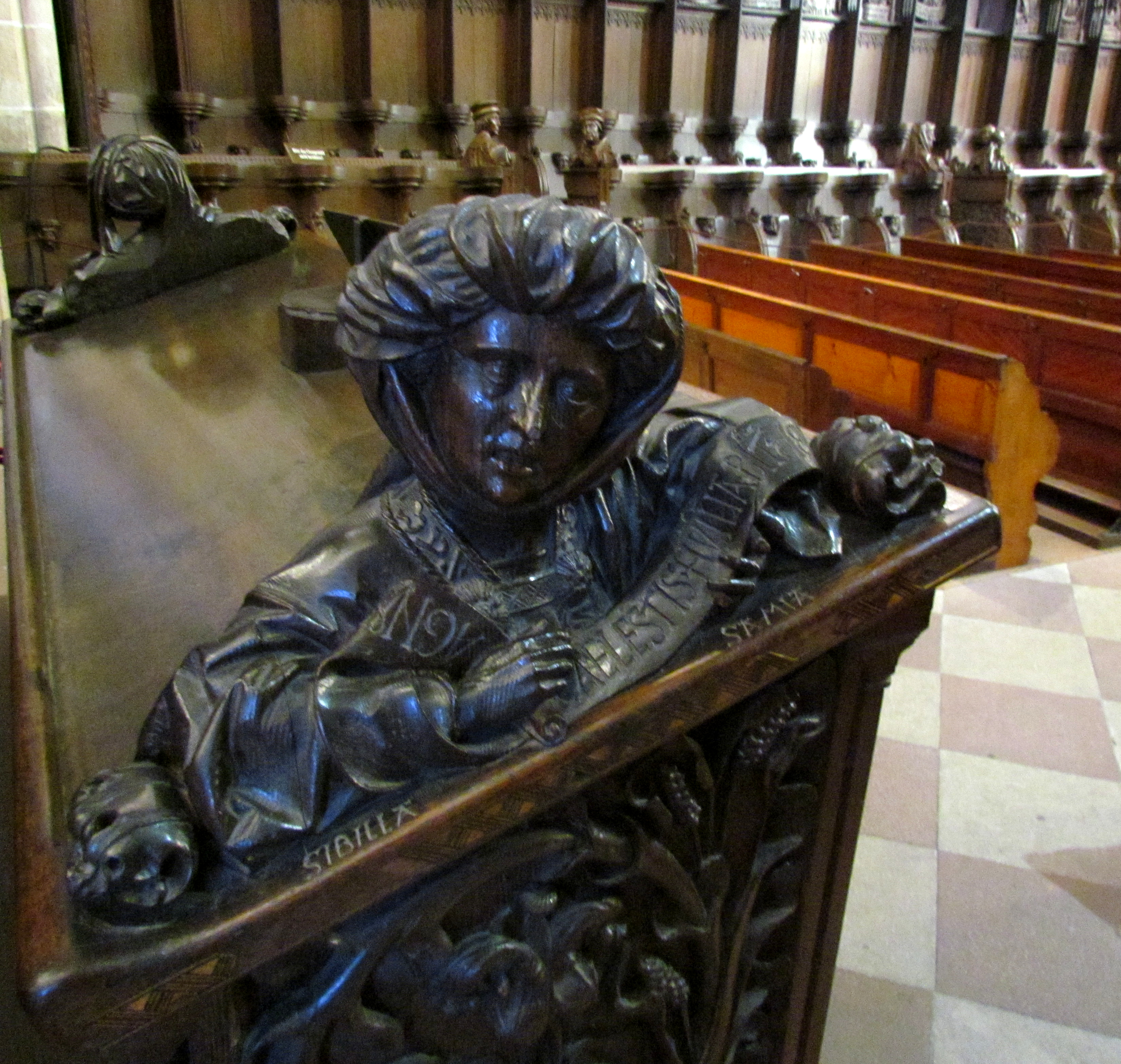 Bildinhalt: Figur im Chorgestühl der Ulmer Münsters Aufnahmeort: Ulm, Deutschland